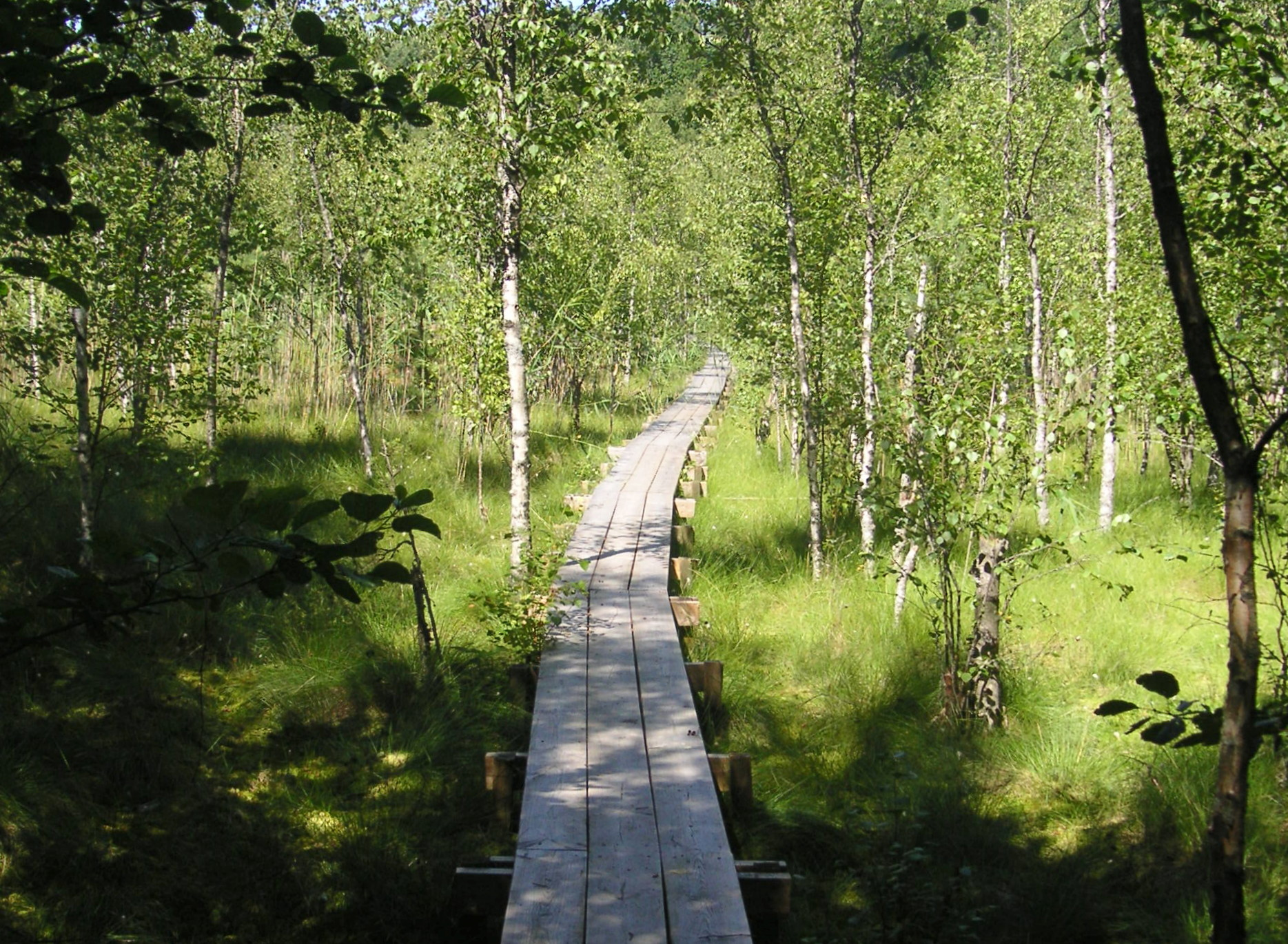 Sjön Aspen promenadstig